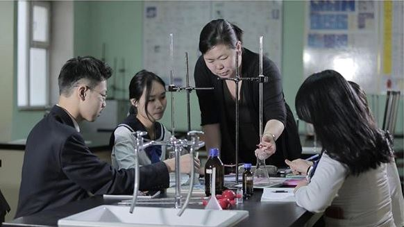 Монгол: Шинэ Монгол сургуулийн сурах орчины талаарх мэдээлэлд хавсралт болгох зорилгоор нийтлэв.